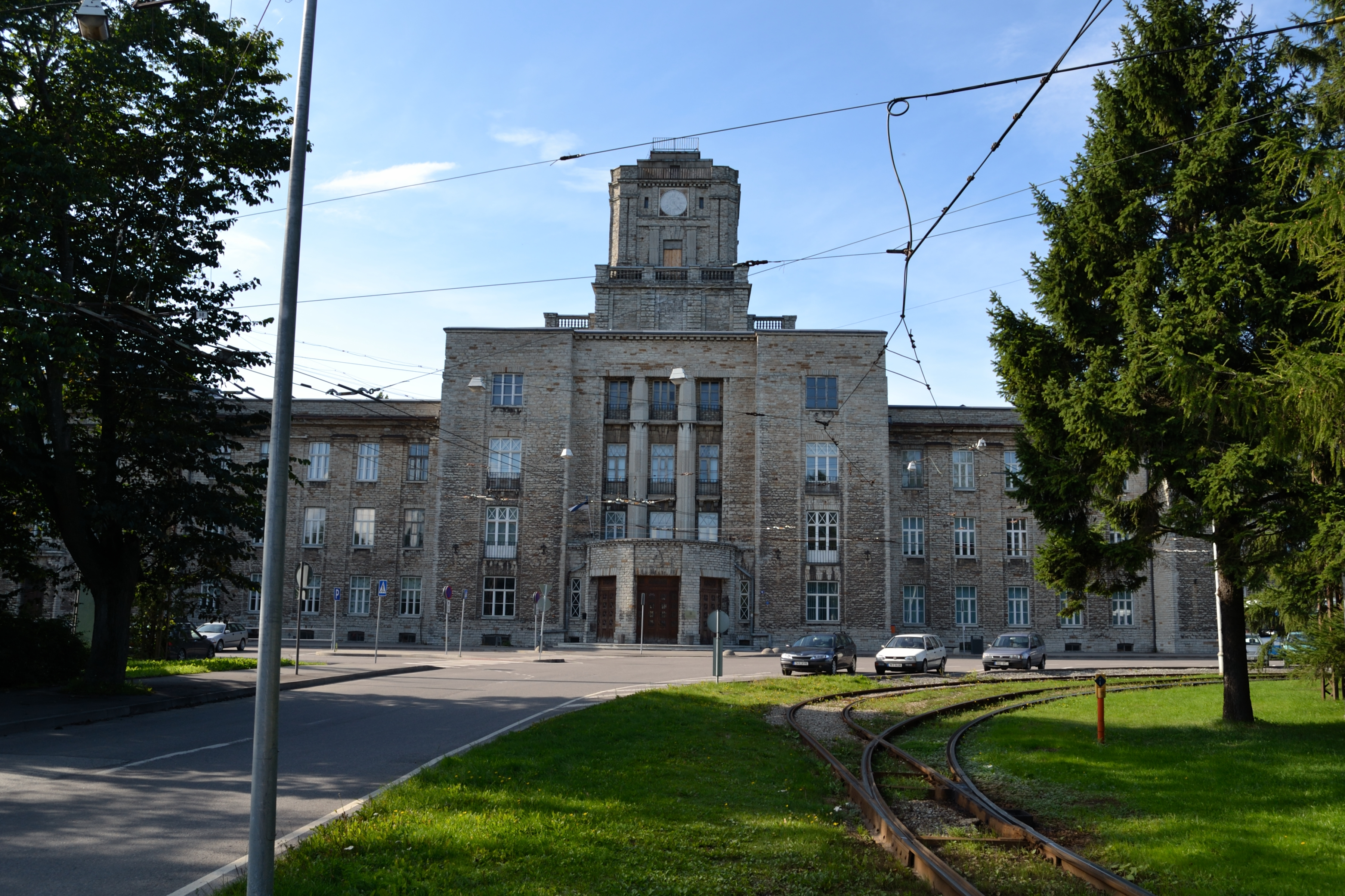 Balti Laevaehitustehase peahoone, 1913-15. ,planeering 1912–1914, arhitekt Aleksander Dmirtijev (Peterburi).